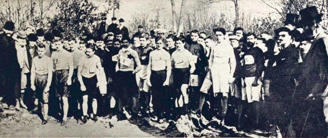 Départ du championnat de France de cross-country de 1896 à Ville-d'Avray (et hippodrome de La Courneuve), vainqueur Michel Soalhat (et aussi par équipe, avec le RCF); trois racingmen aux trois premières places, deuxième Albin Lermusiaux, et troisième Félix Bourdier.